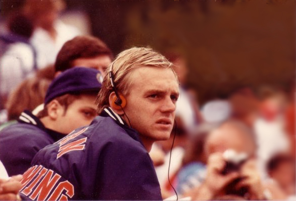 Ambrose Rowdy Gaines by RB